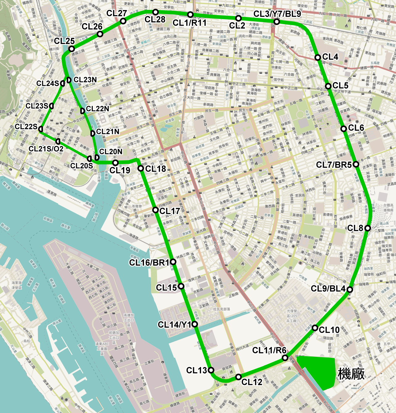 改名臨港輕軌後的版本